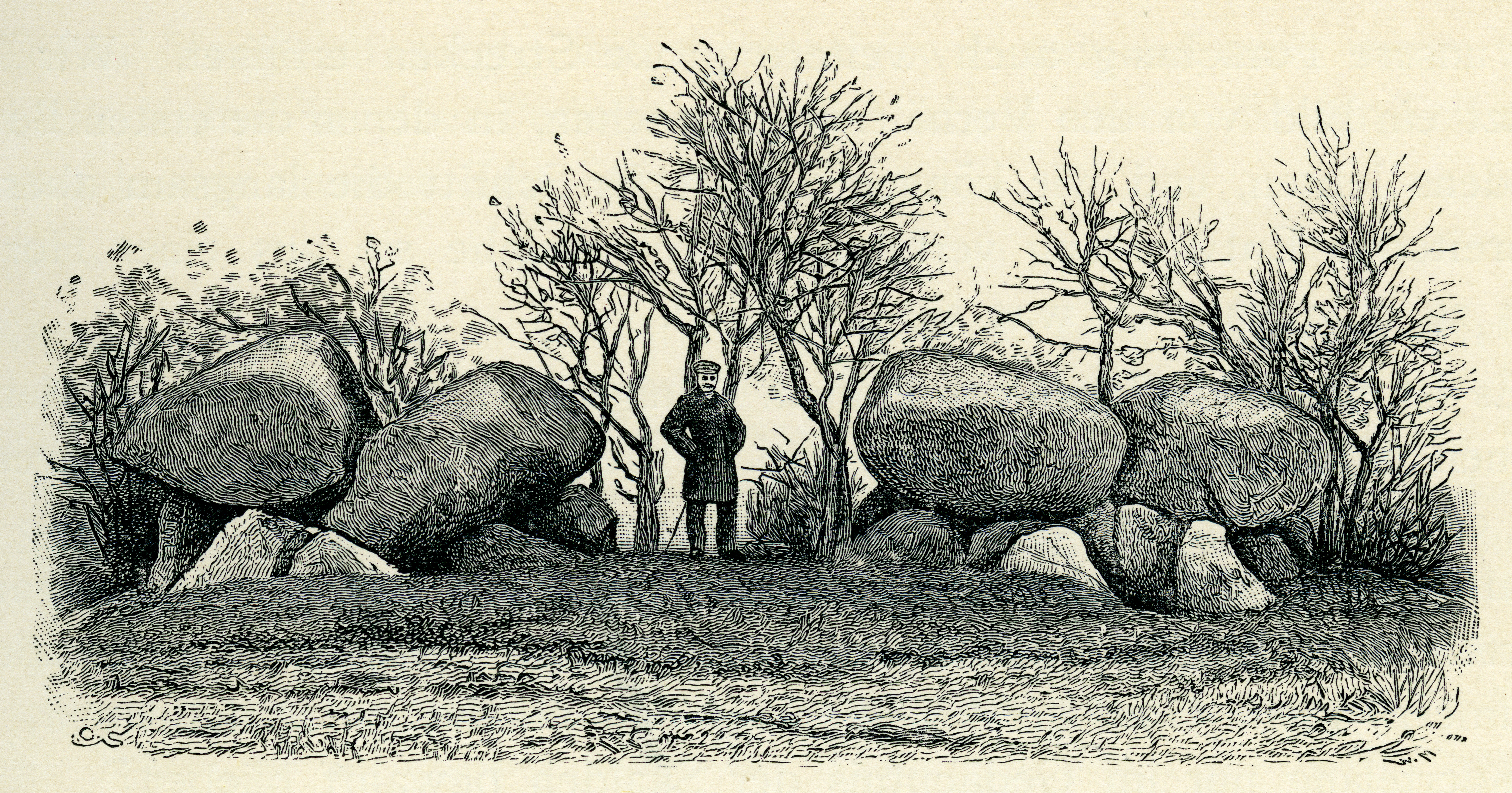 Träsnitt föreställande subbelgånggriften i Snarringe (RAÄ-nummer Hammarlöv 2:1), Hammarlövs socken, Skytts härad, Trelleborgs kommun, Skåne, Sverige. Träsnittet är ur Kulturgeschichte Schwedens von den ältesten Zeiten bis zum elften Jahrhundert nach Christus (1906) av Oscar Montelus, sidan 1, figur 1.